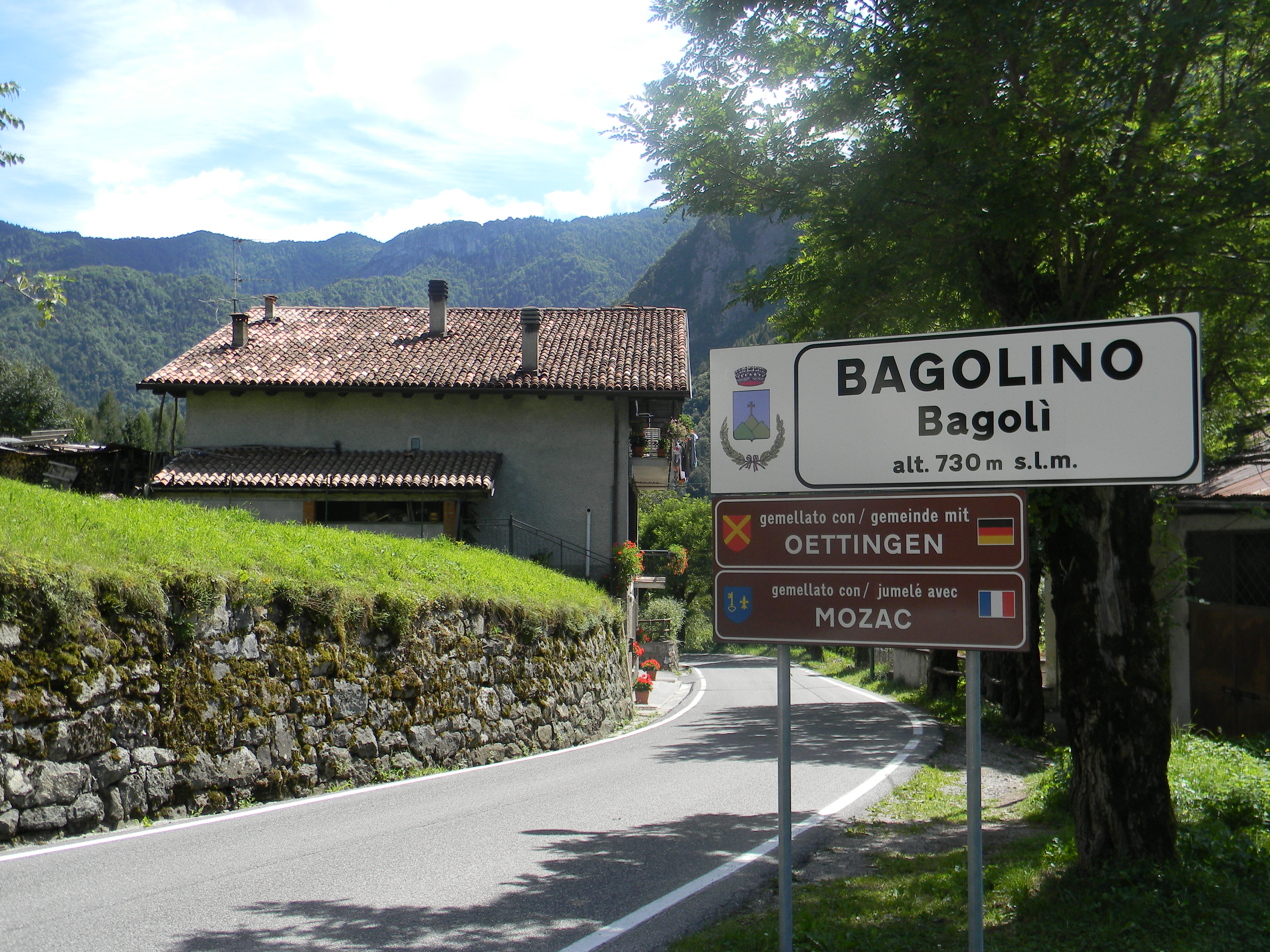 Panneau d'entrée de la ville italienne de Bagolino (Bagolì en dialecte). Altitude: 730m au dessus de la mer. Jumelée avec Mozac en France, et Oettingen en Allemagne.